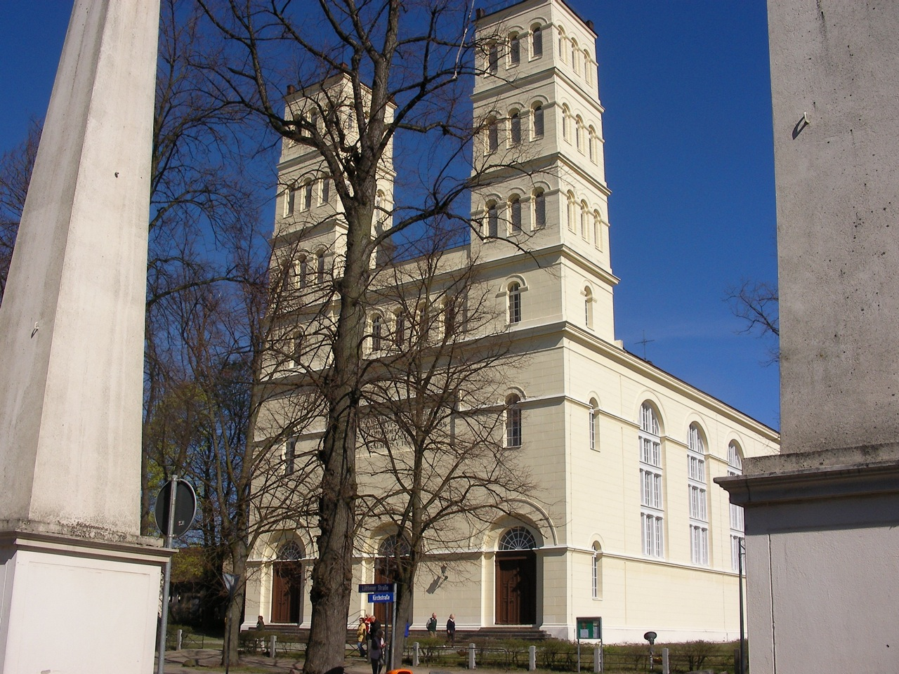 Dorfkirche_Straupitz Erbaut nach Entwürfen von Karl Friedrich Schinkel.